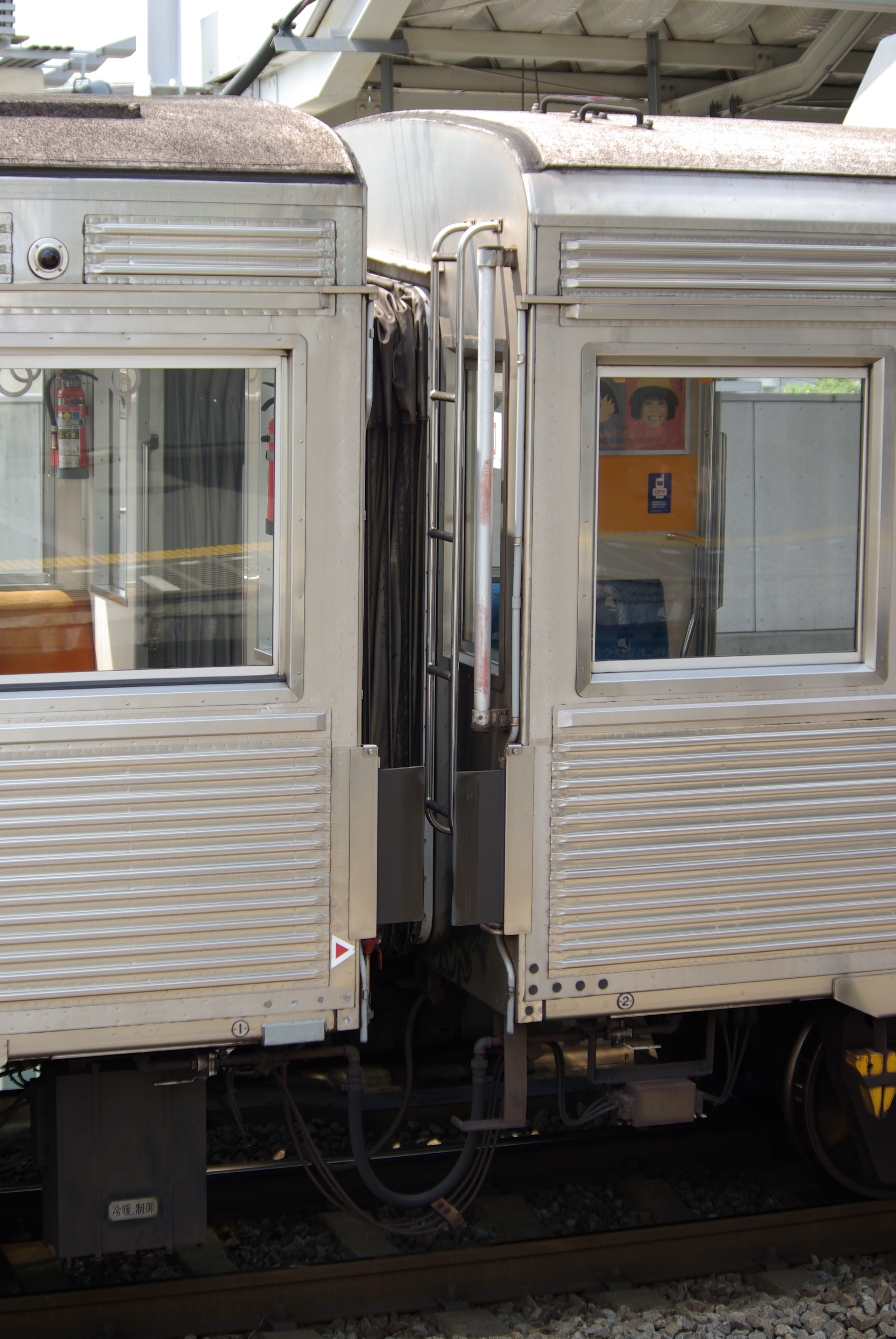 東急8500系電車 サハ8951の誘導無線(IR)アンテナ